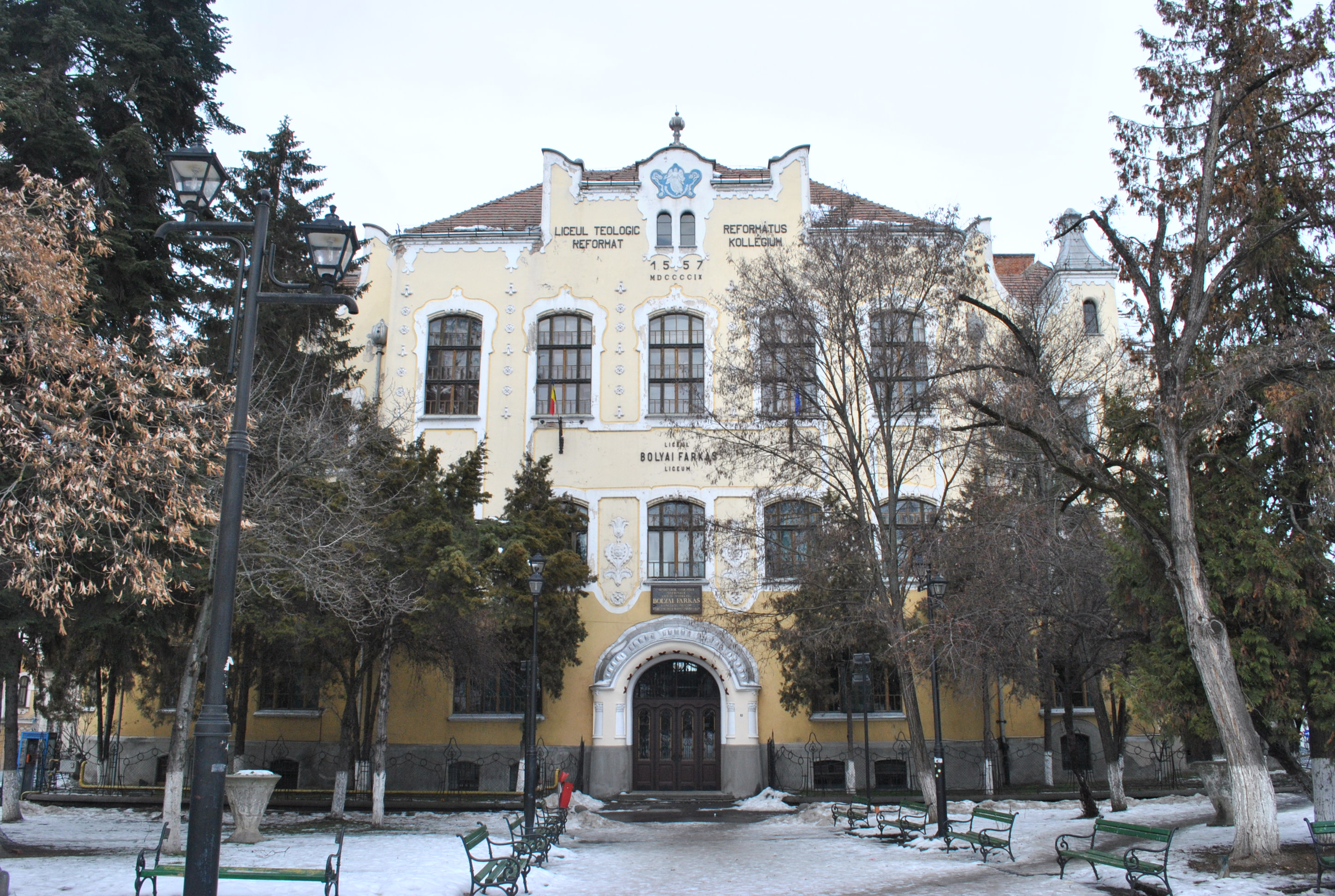 Ansamblul liceului "Bolyai Farkas" 01